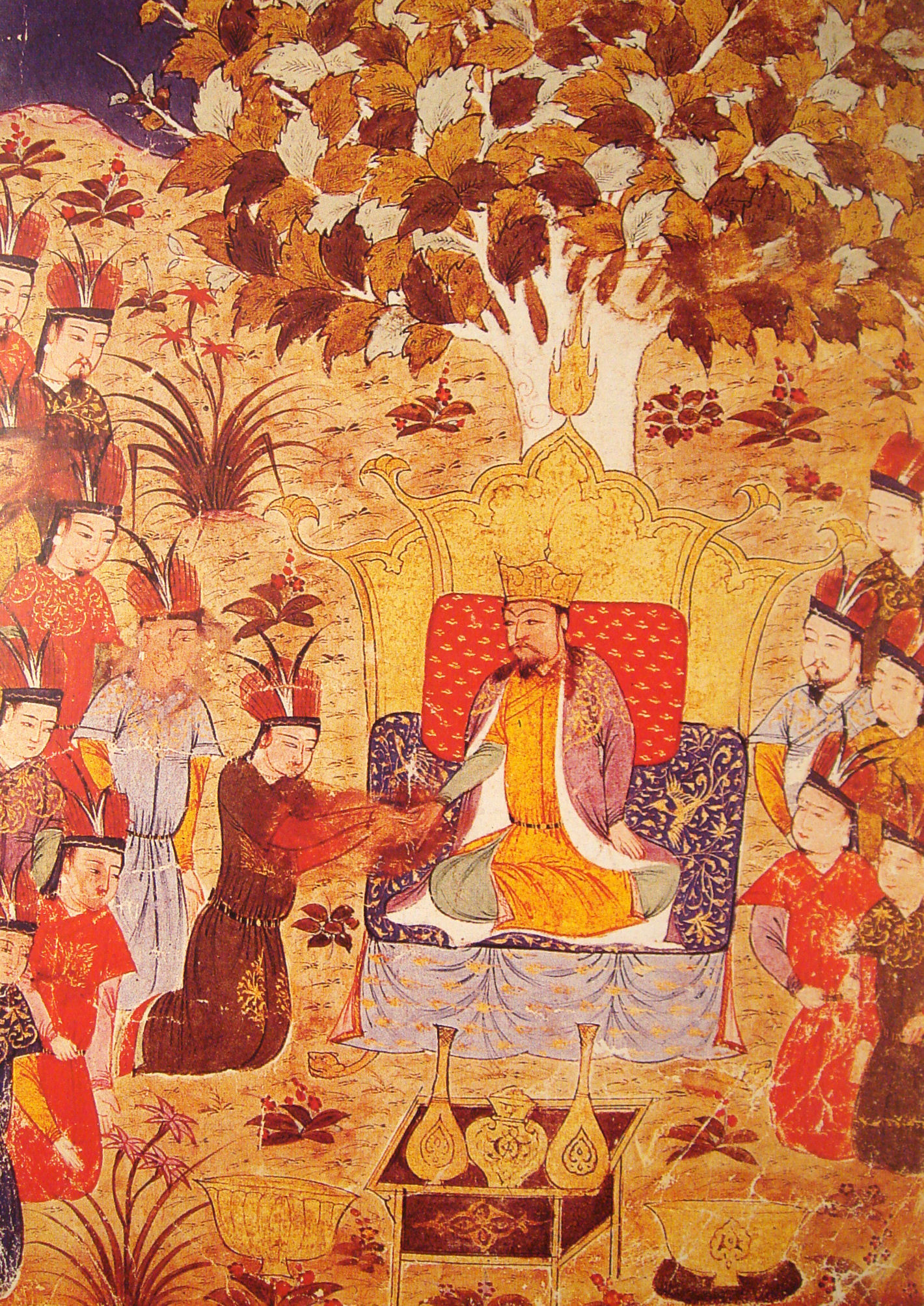 Coronation Of Ogodei, 1229